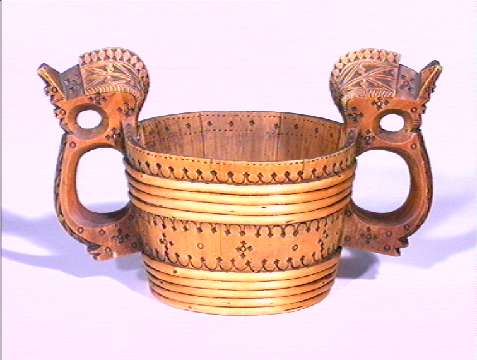 Staup datert 1777 fra Vik i Sogn og Fjordane, Norge. Lengde 31 cm. Norsk Folkemuseum, NF.1992-0630.